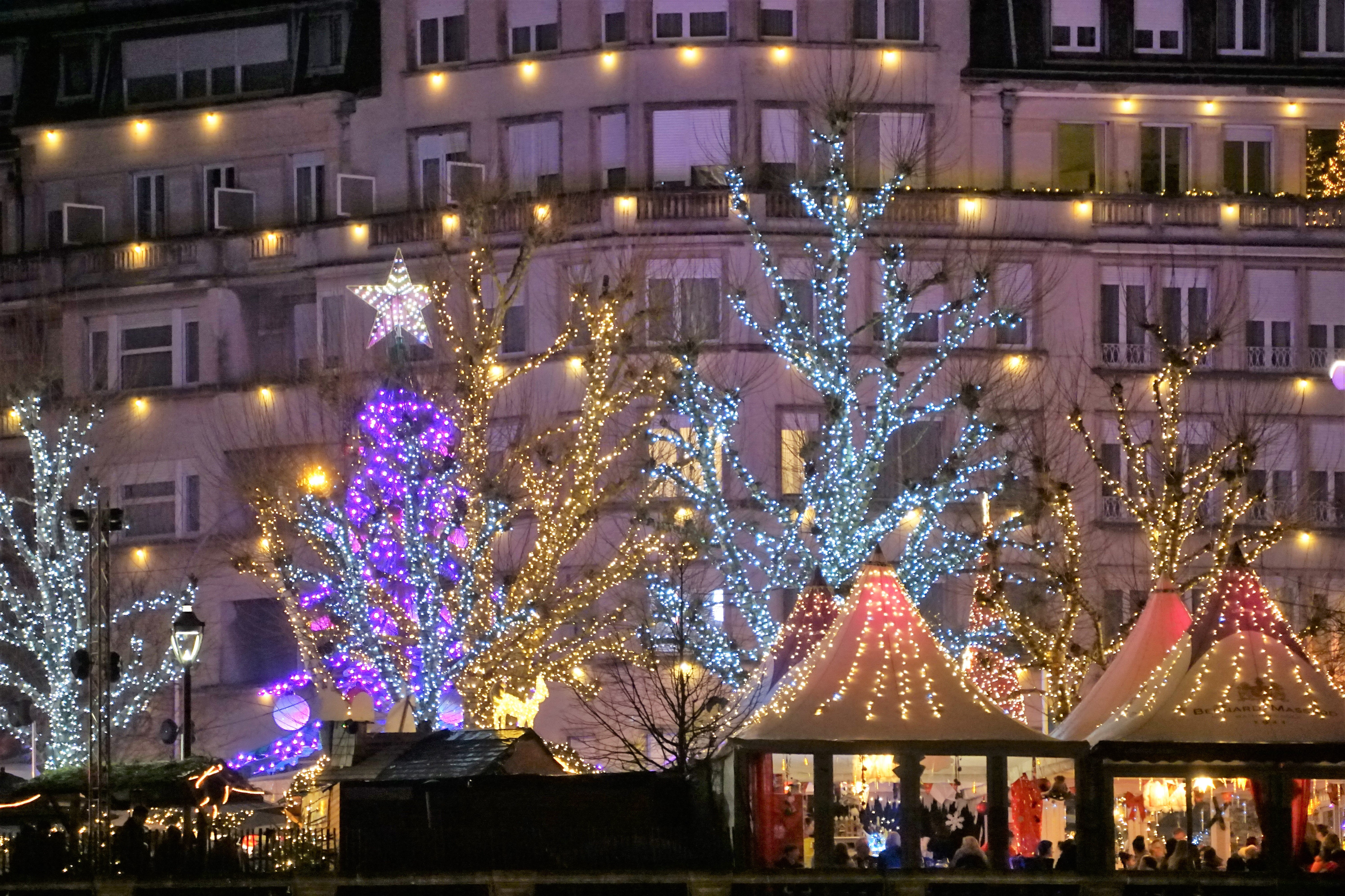 Luxembourg, illumination de Noël. Place de la Constitution, vue depuis la passerelle piétonnière sous le pont Adolphe.